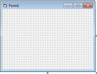 Nouvelle Form en VB